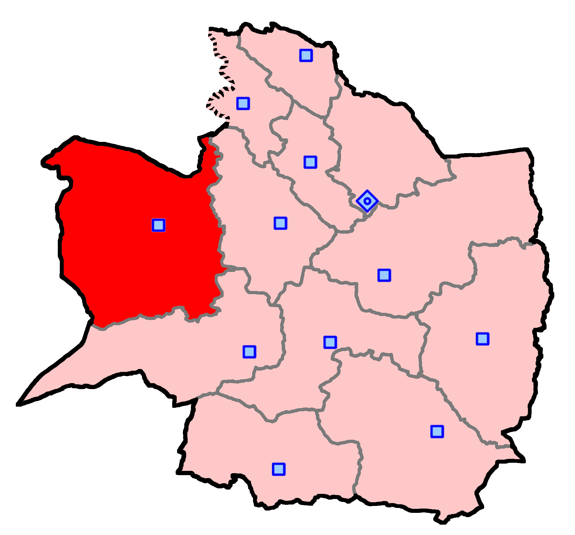 حوزهٔ انتخاباتی سبزوار برای انتخابات مجلس شورای اسلامی